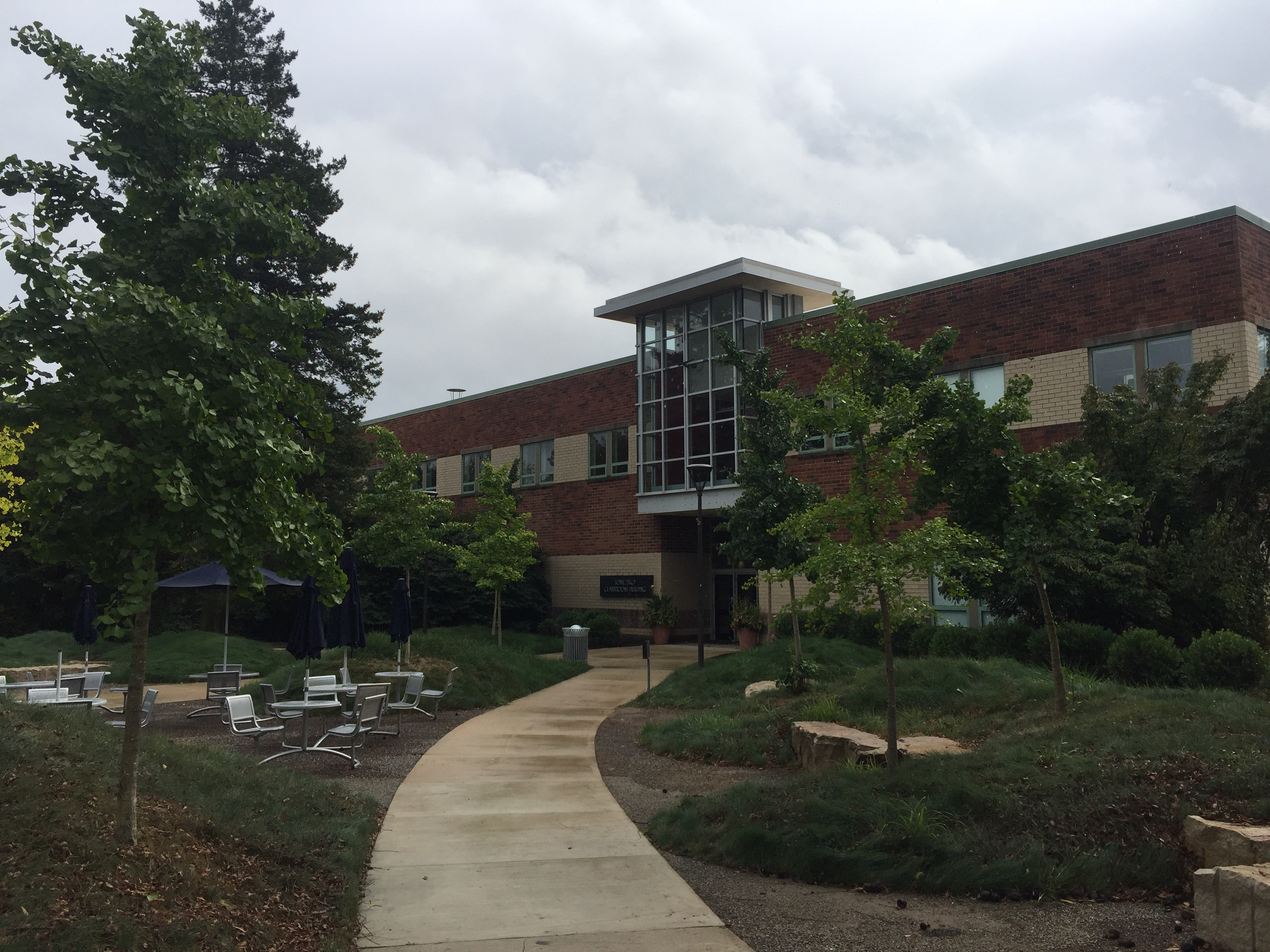 Tomiezko Classroom building